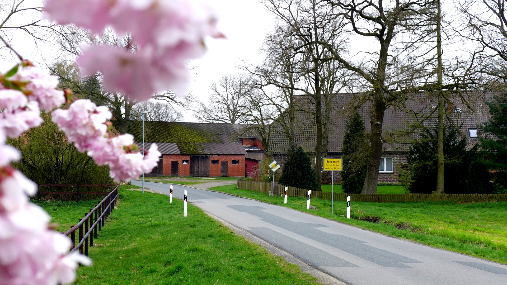 Ortseingang von Bottendorf, zugehörig der Gemeinde Obernholz im Landkreis Gifhorn. Aufnahmedatum 2016-04.